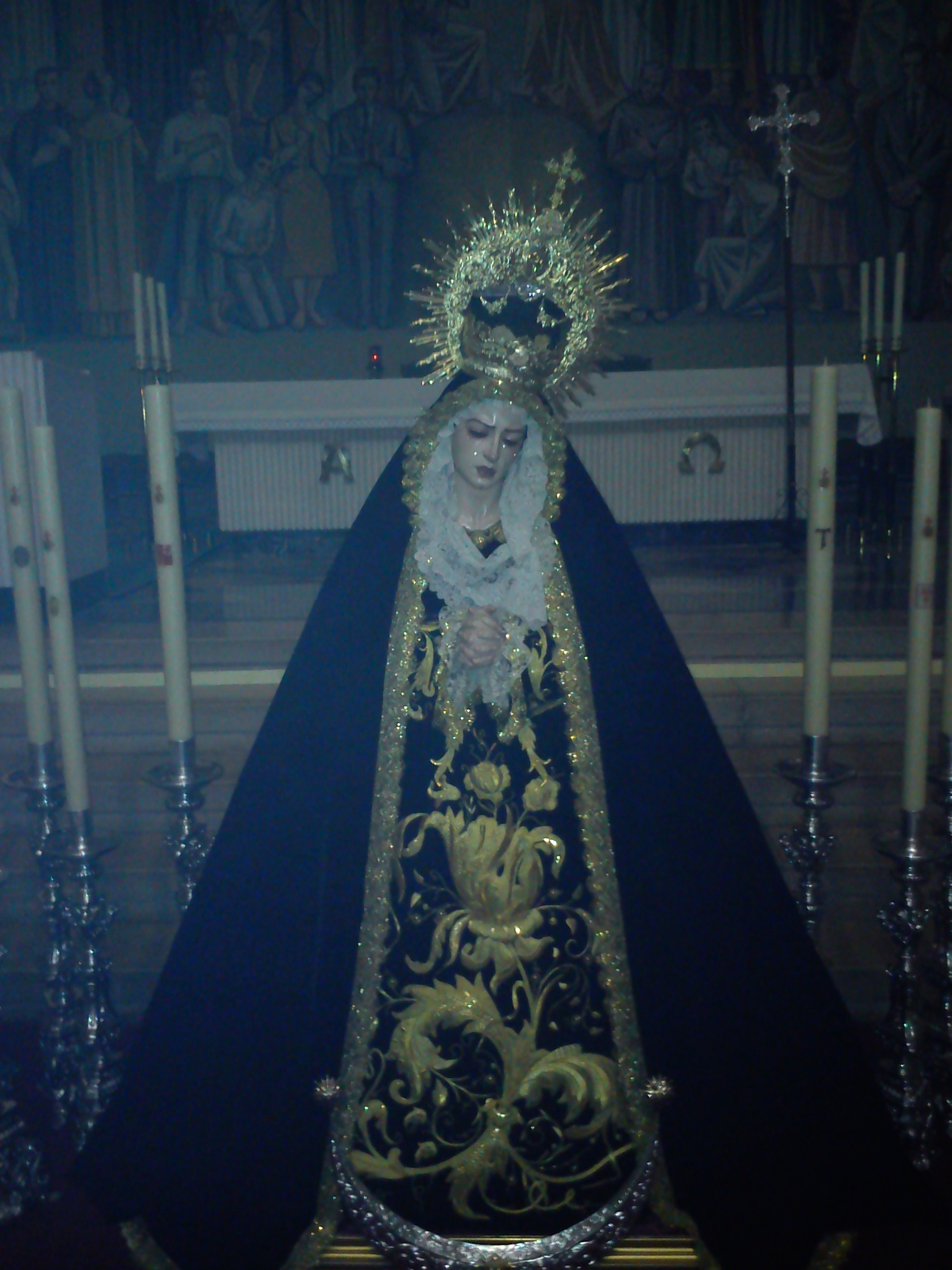 Imagen de María Santísima Madre de Dios de la Cofradía del Silencio de Jaén.